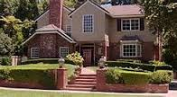 La imagen esta basada en la casa de Henry Hart de Henry Danger